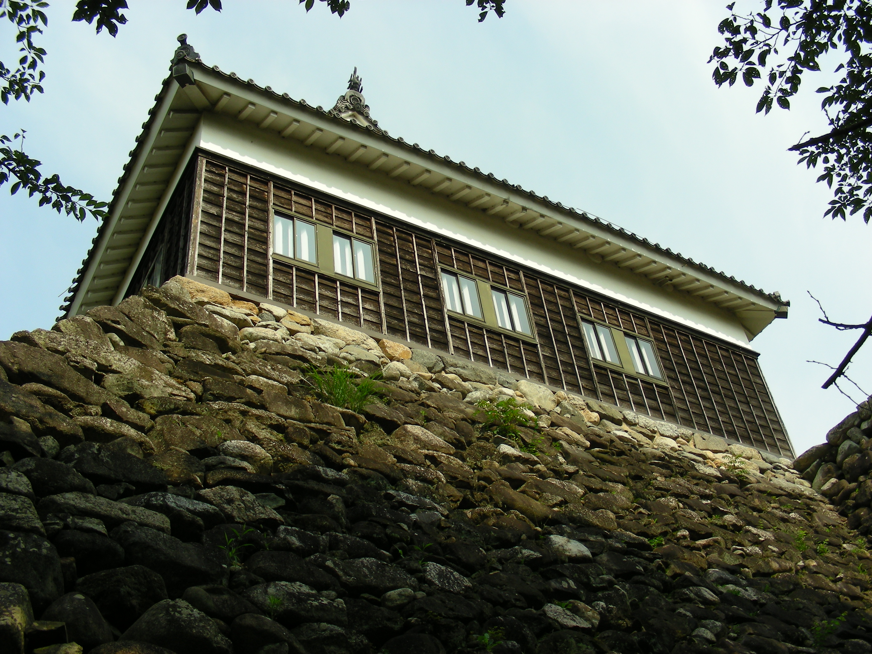 亀山城多聞櫓（復元前）